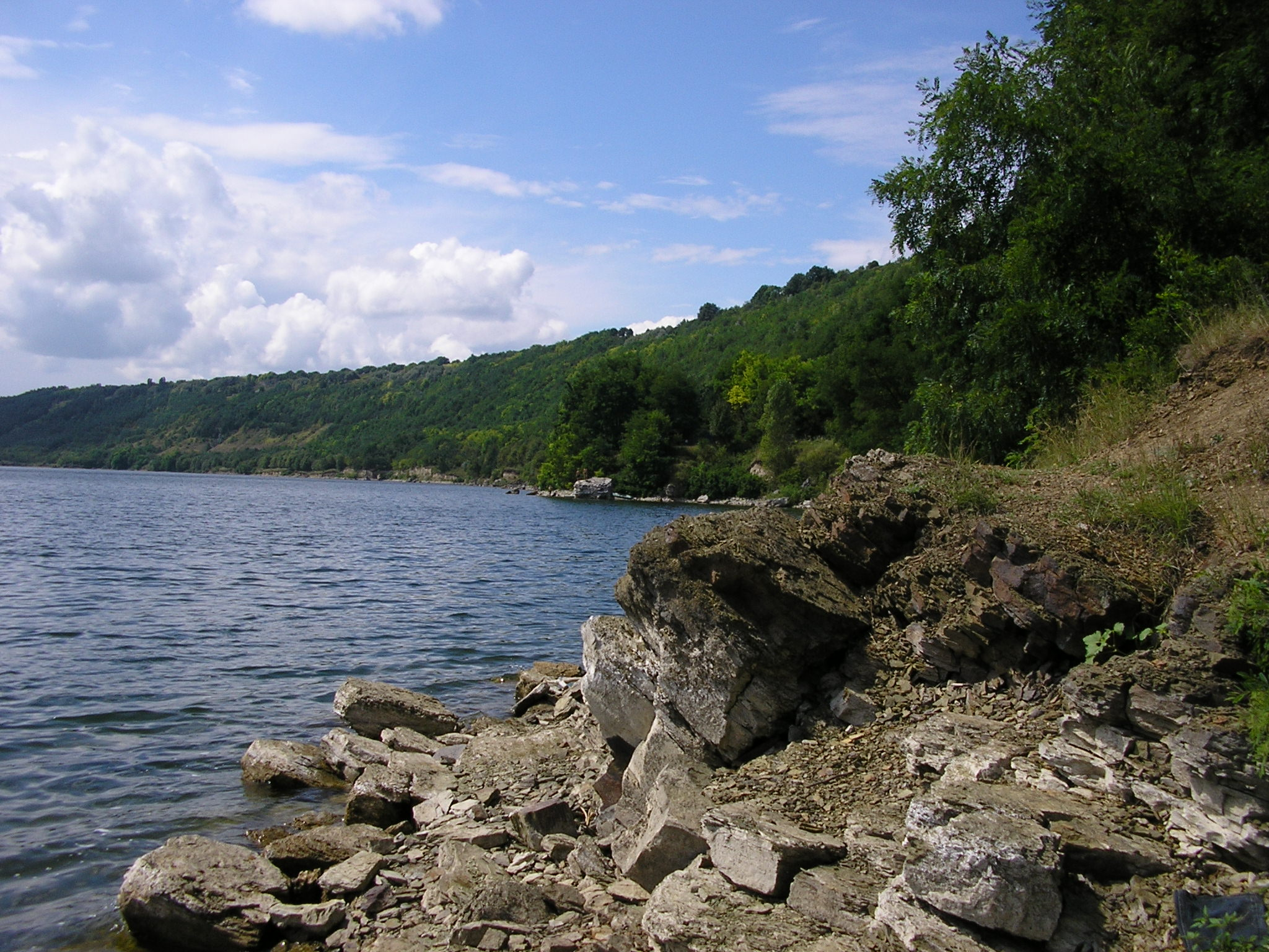 Берег Дністровського водосховища біля села Рудківці